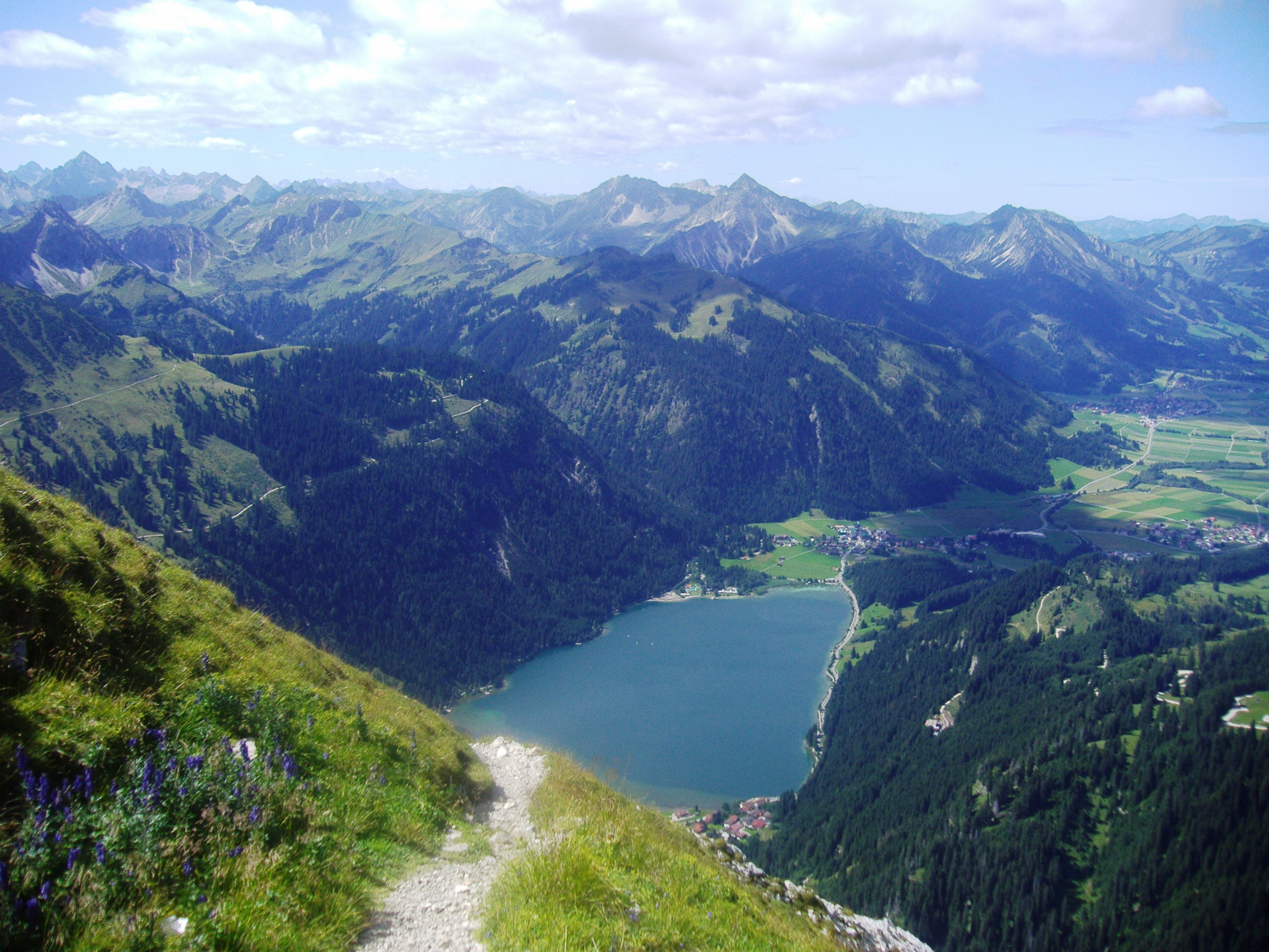 Blick von der Roten Flüh (2108 m ü NN) auf den Haldensee im Tannheimer Tal in Tirol